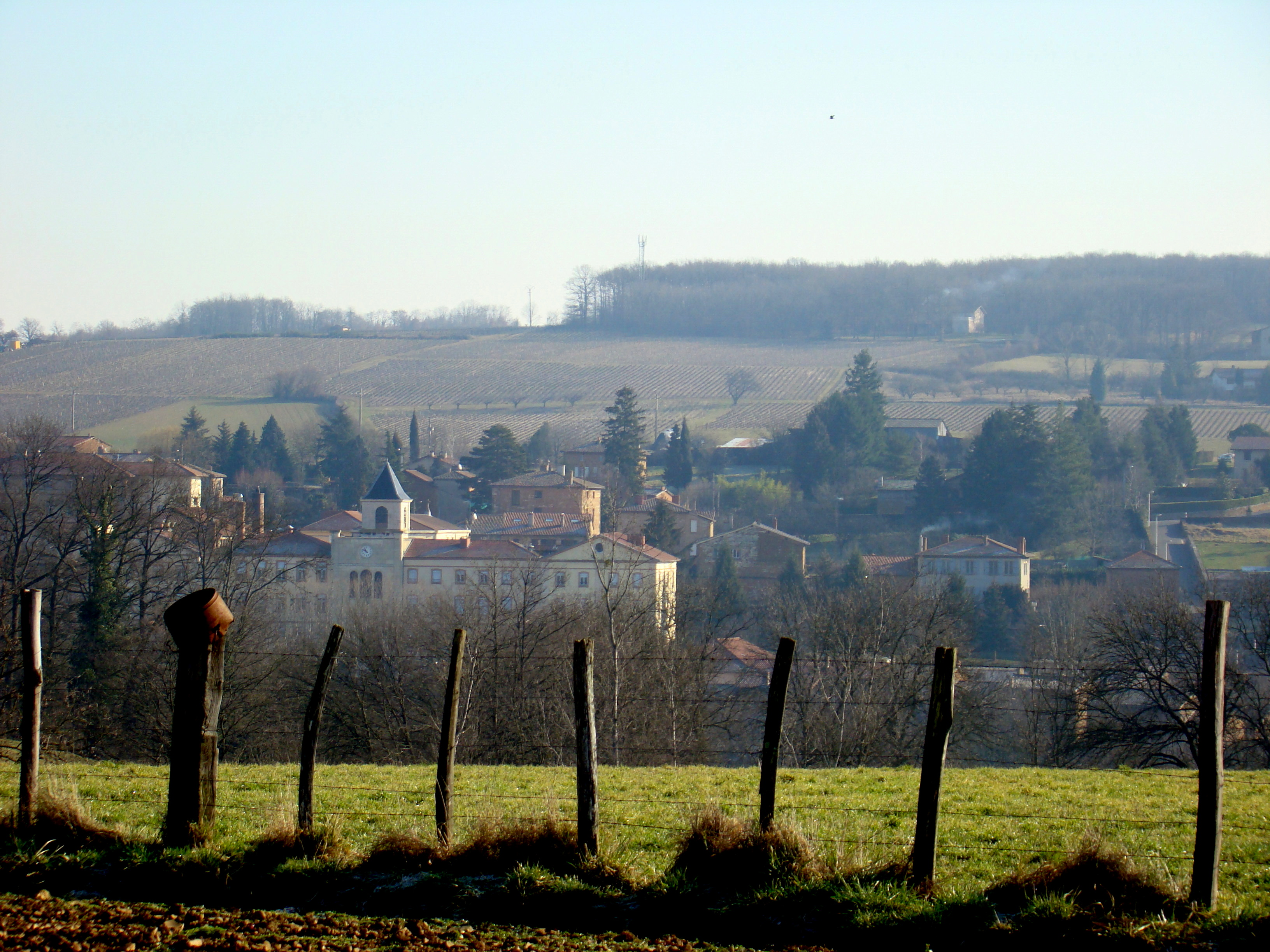 Vue d'Alix.